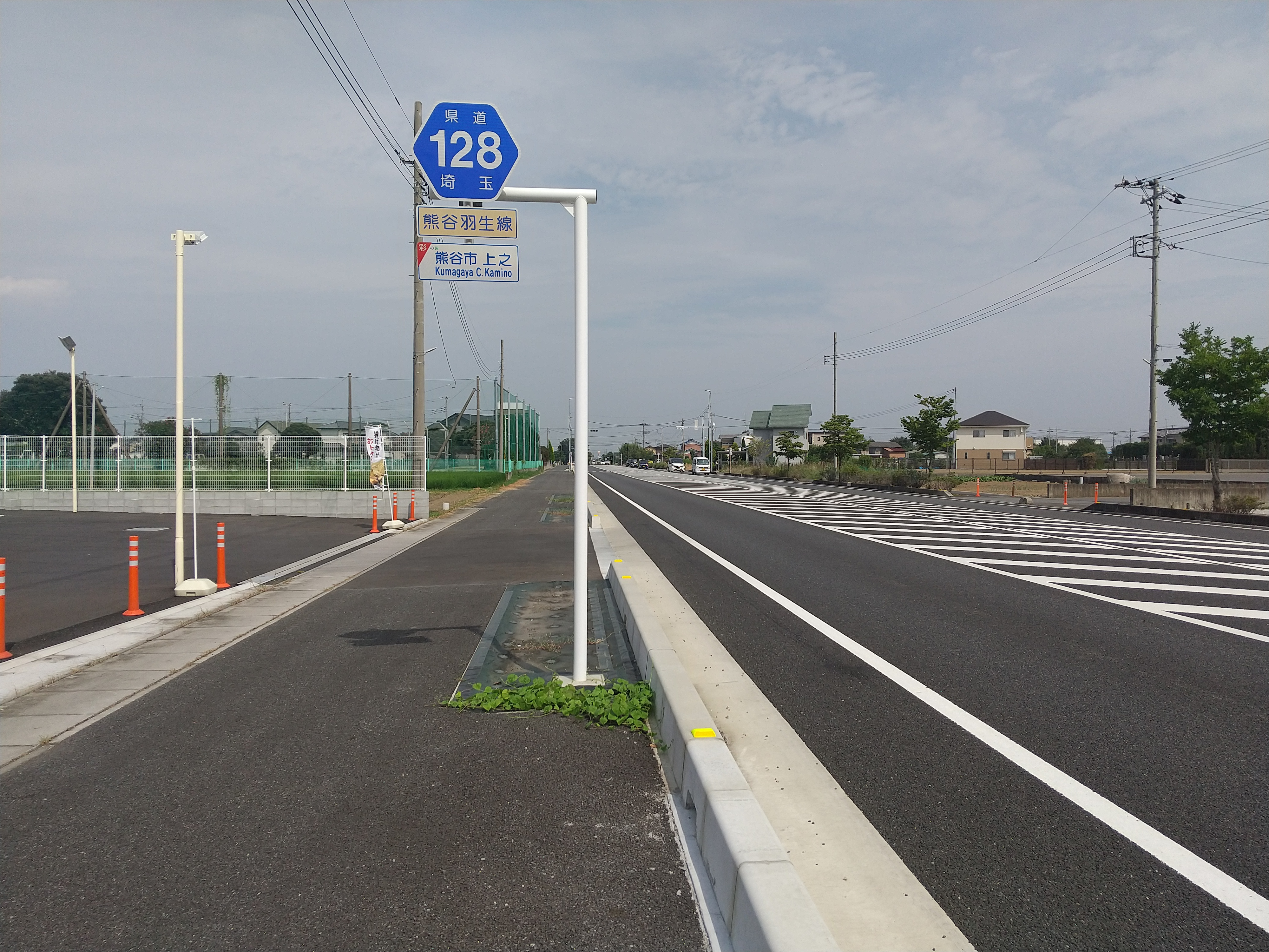 熊谷市上之付近にて